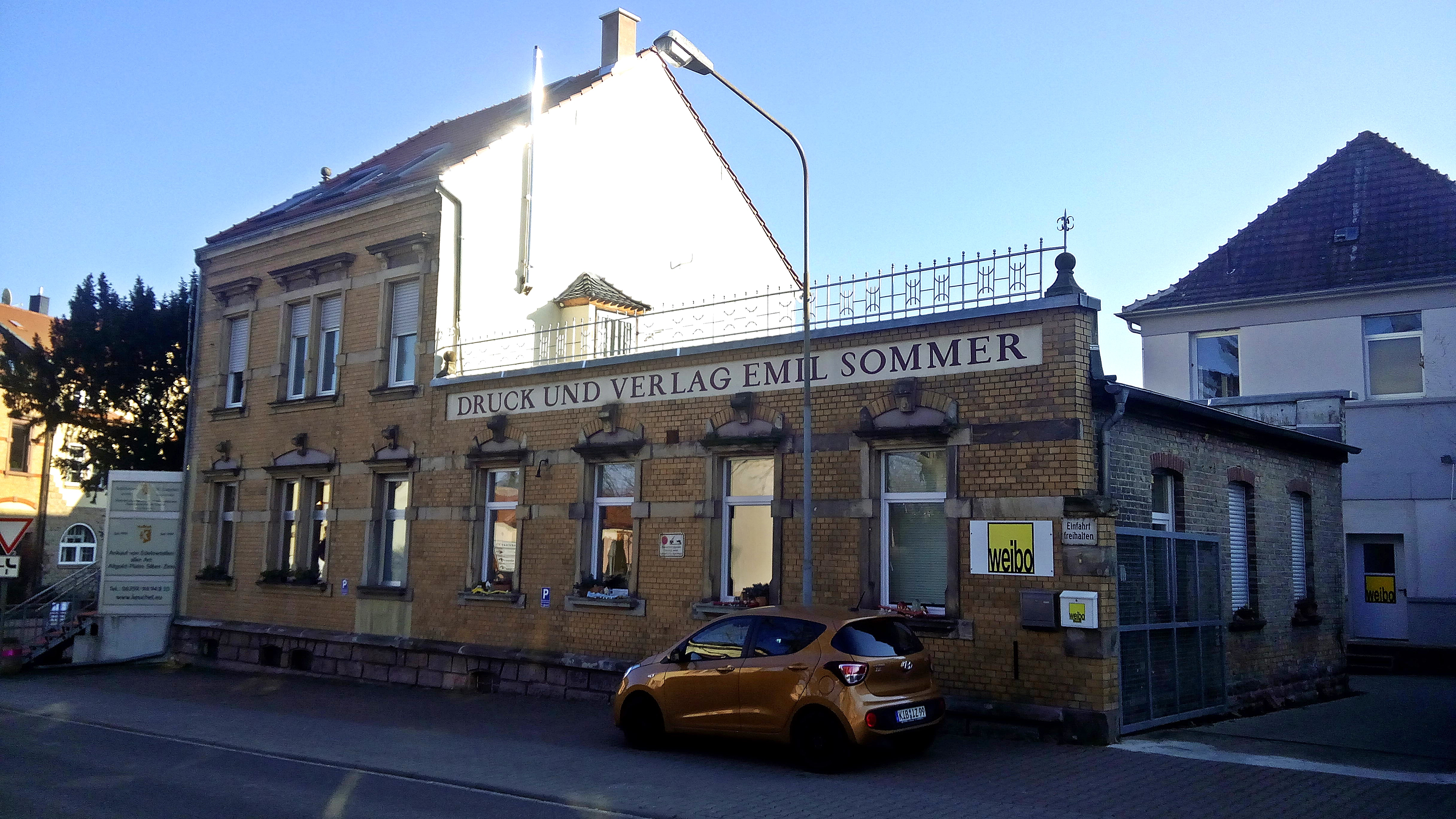 Ehem. Verlagshaus Emil Sommer Grünstadt, Kirchheimer Str. 20